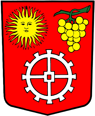 Wappen von Mollens Kanton Wallis Schweiz